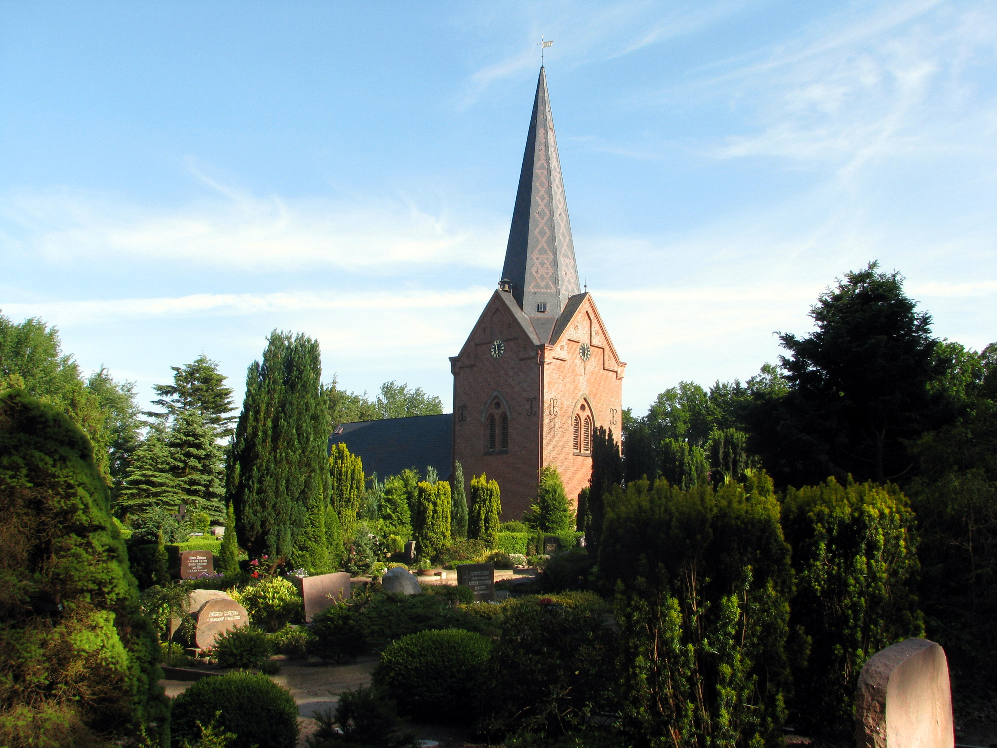 Die Drelsdorfer Kirche St. Marien- und St. Johannis mitsamt dem sie umgebenden Friedhof der evangelisch-lutherischen Kirchengemeinde